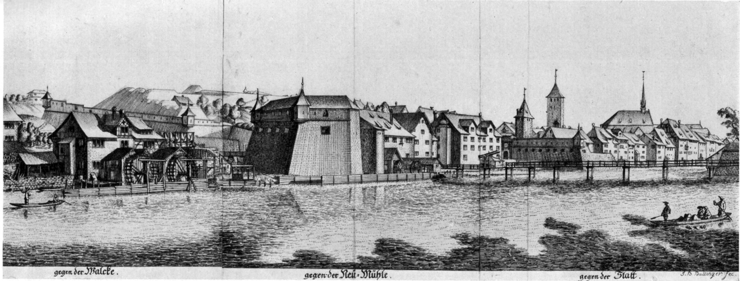 Das Paradiesbollwerk in Zürich vom Platzspitz aus gesehen. Links die Walche, dahinter das Leonhardsbollwerk, rechts die Neumühle und das Niederdorftor, der Ketzerturm und der Chor der Predigerkirche. Radierung von Johann Balthasar Bullinger, in: Hundert Schweitzer Prospecte, 1770.